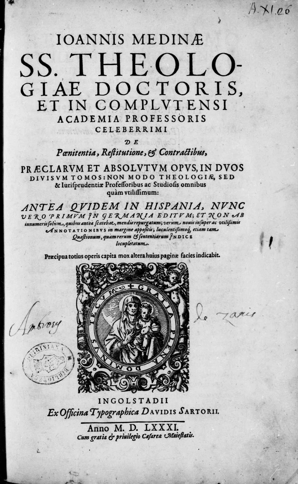 Frontespizio